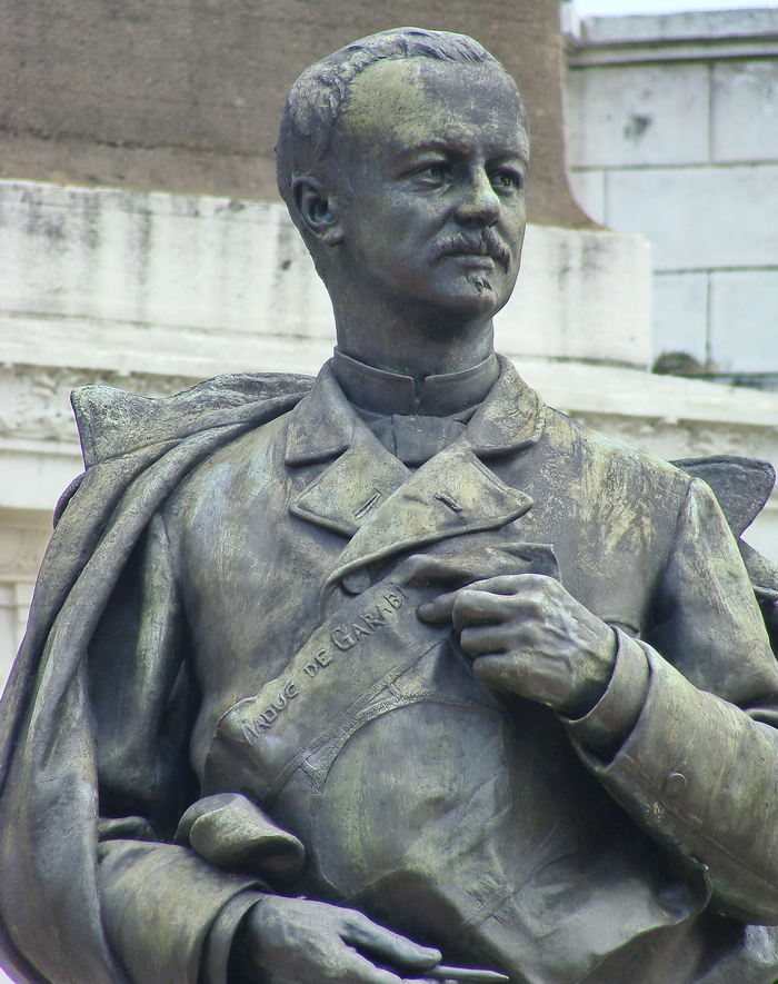 Busto de León Boyer en la Plaza de Francia en ciudad de Panamá.